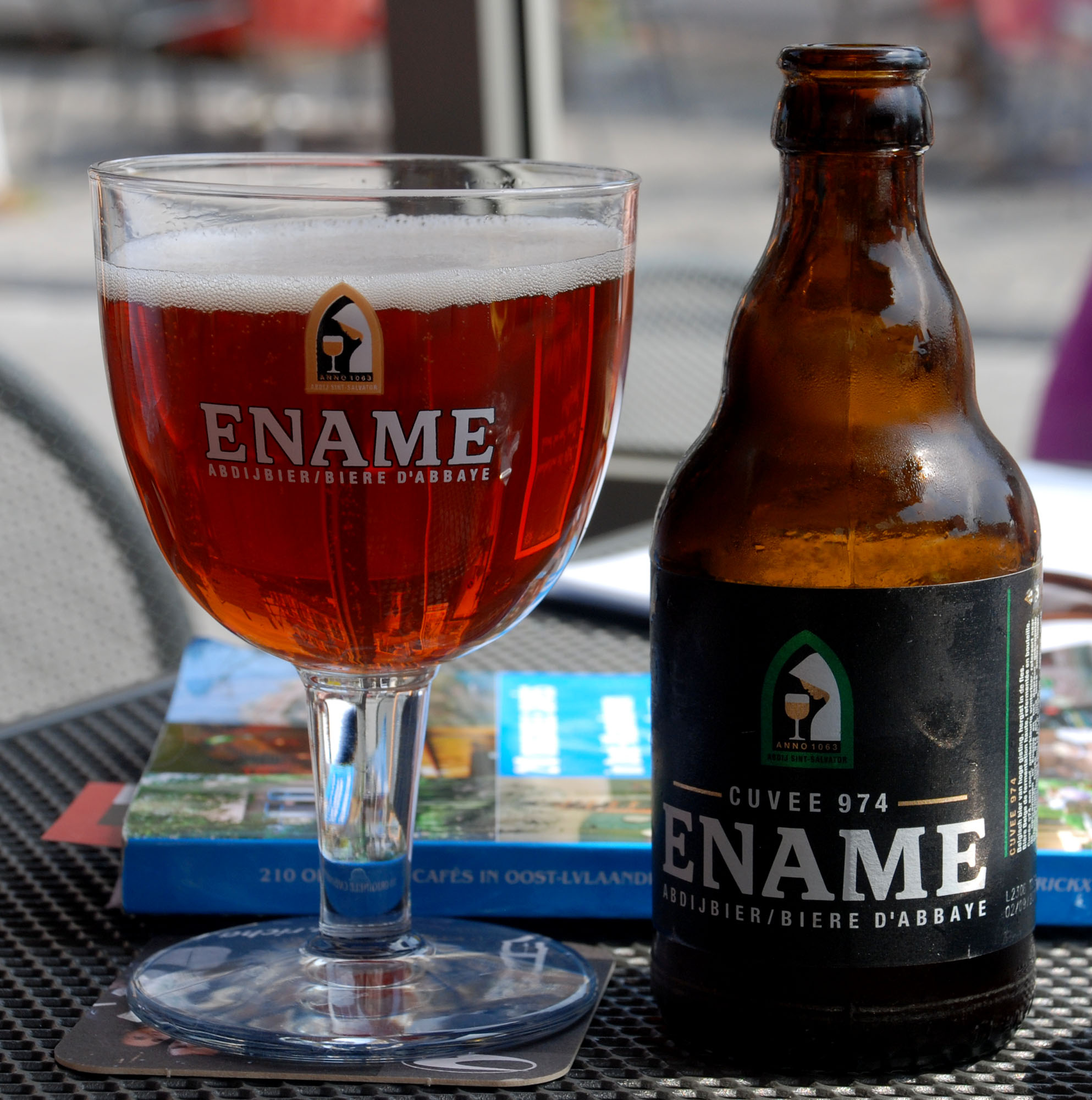 Ename Cuvee 974